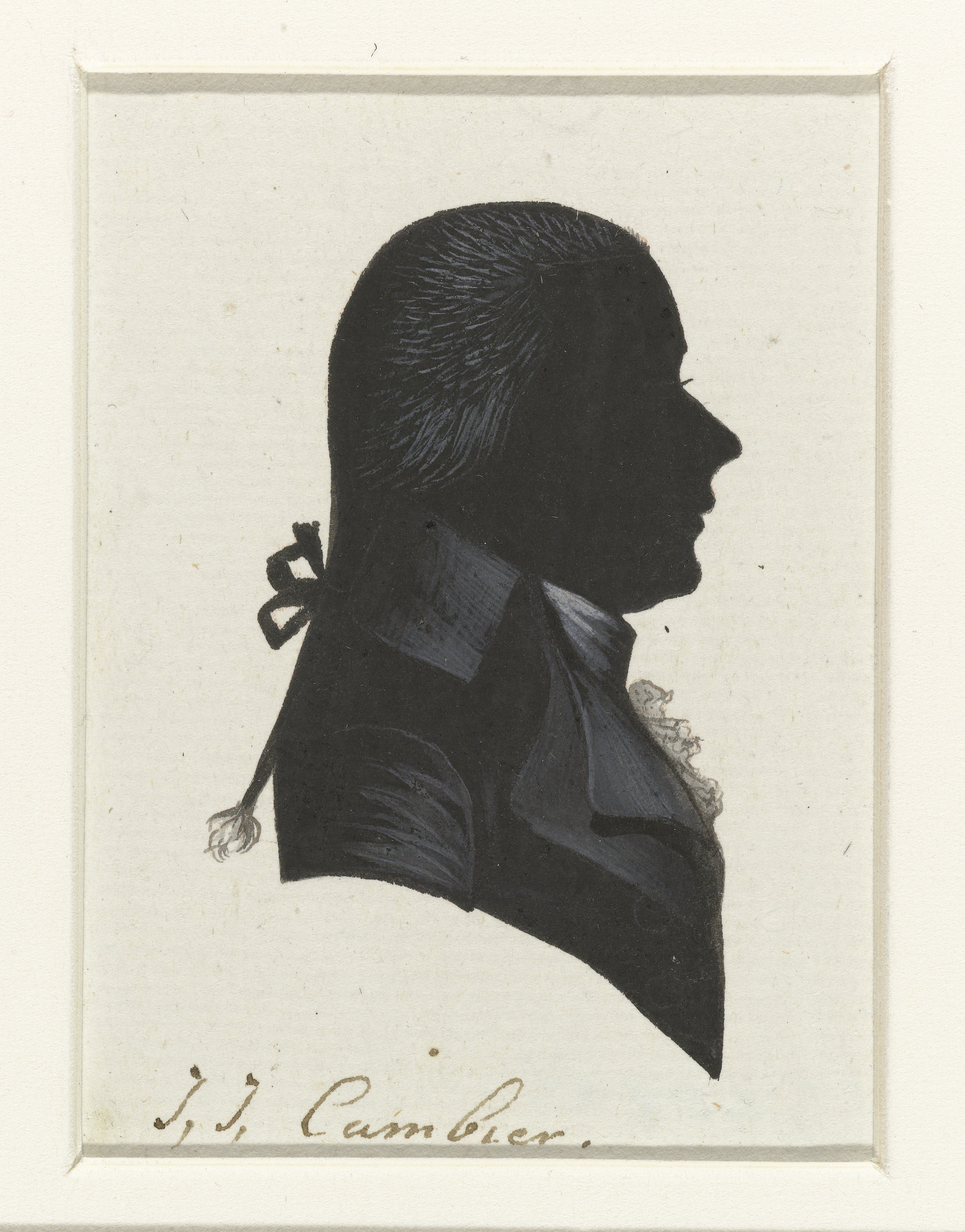 J.J. Cambier. Tekening in Oost-Indische inkt, waarschijnlijk gemaakt door Hausdorff. De tekening behoort tot een serie van portretten van afgevaardigden naar de Eerste Nationale Vergadering in 1796-1797. Van de serie werden gravures gemaakt die zijn afgedrukt in "Geschiedenis der staatsregeling, voor het Bataafsche volk", een boek van Cornelius Rogge (1799).